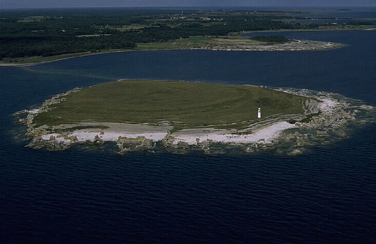 Holmhällar i bakgrunden. Motiv: Heligholmen Nyckelord: Flygbilder, Riksintressen Kategori: Kust- och skärgårdsmiljöHolmhällar i bakgrunden.